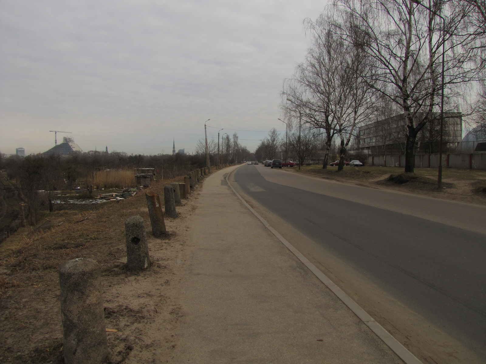 vienibas gatve